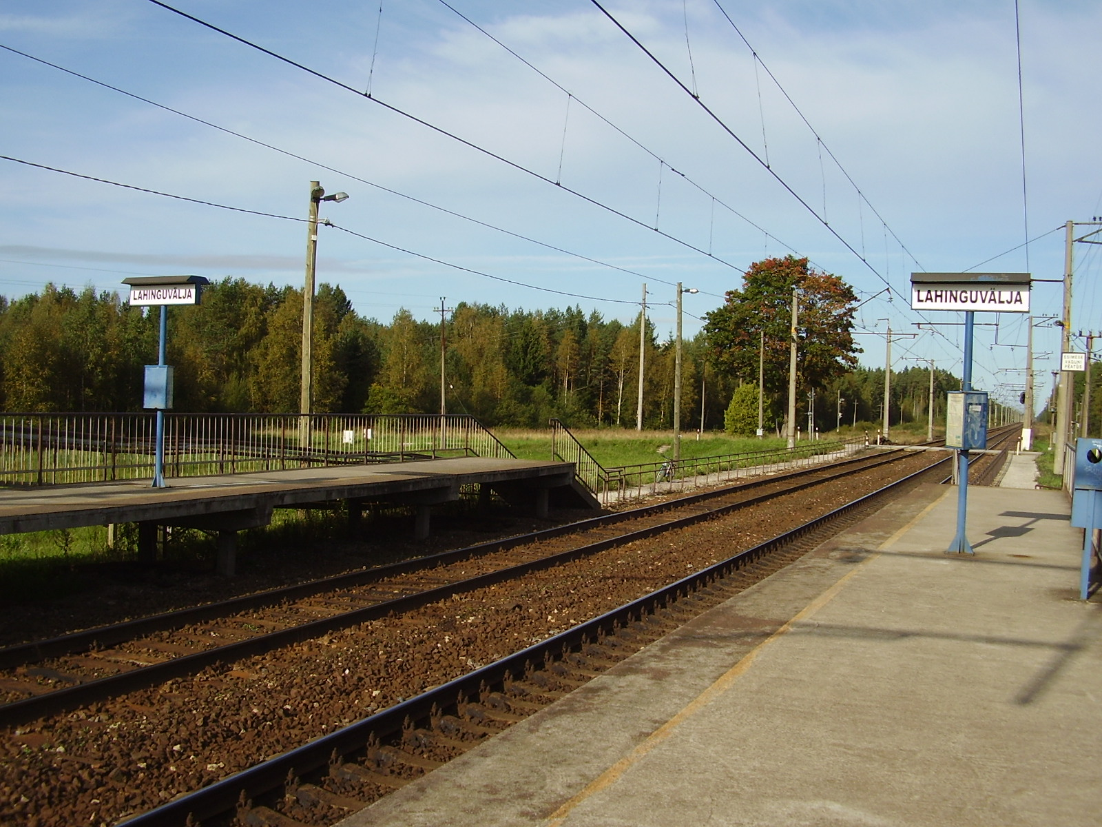 Pilt Lahinguvälja raudteepeatusest